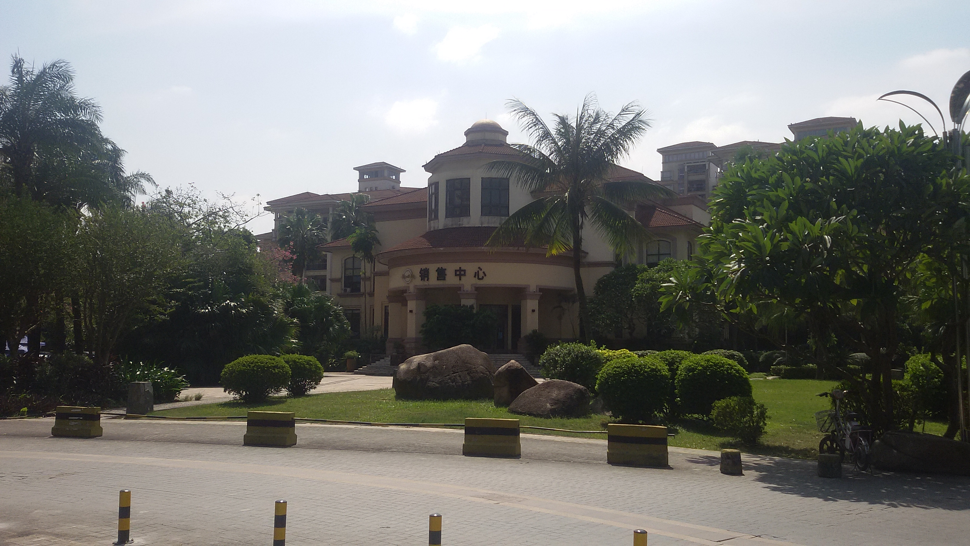 粵語: 廣州美林湖畔